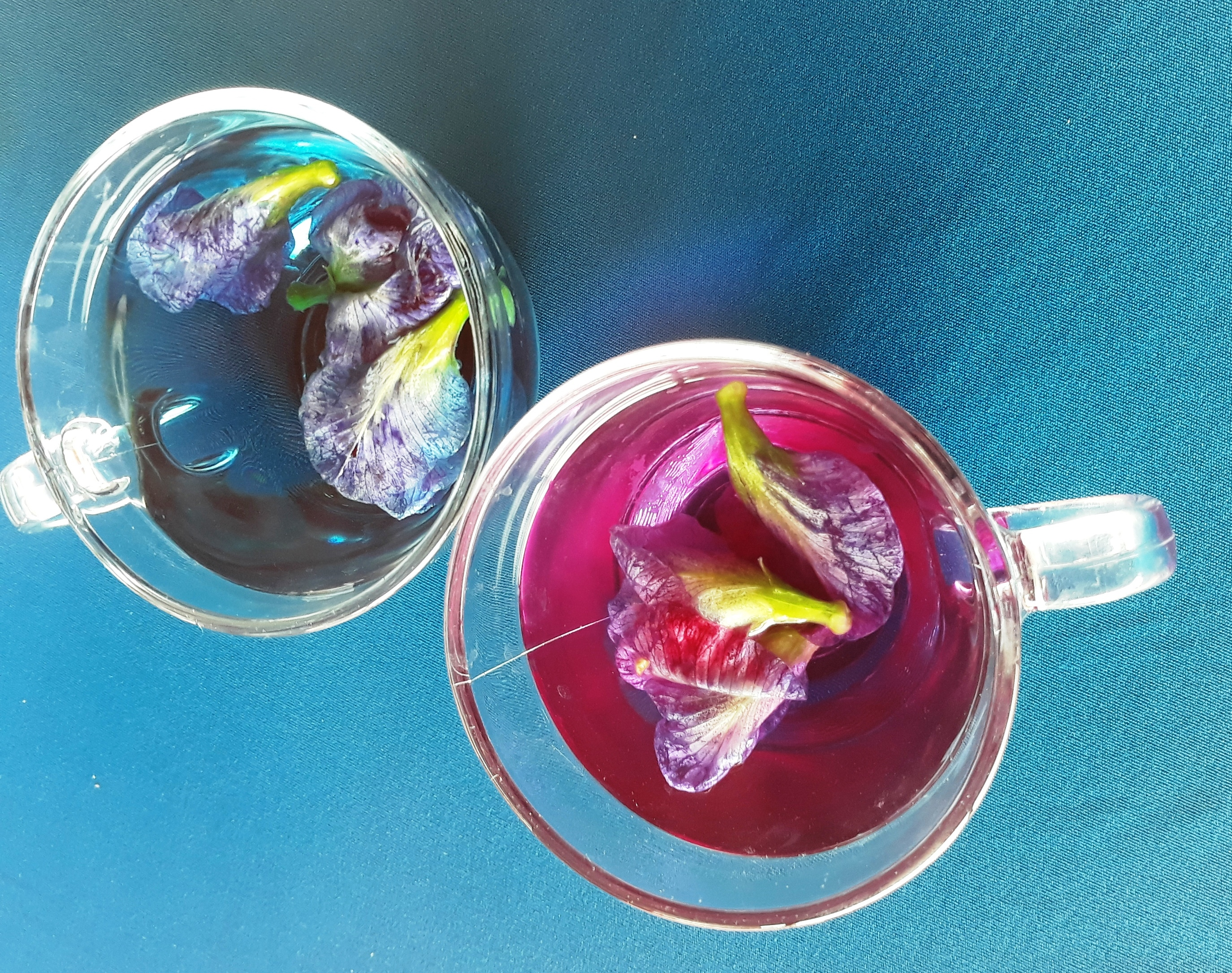 đậu biếc